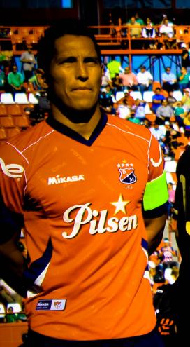 Mexico vs independiente de Medellin, partido de la seleccion mexicana jugado en el estadio Caliente de Tijuana, mas info videos y fotos en